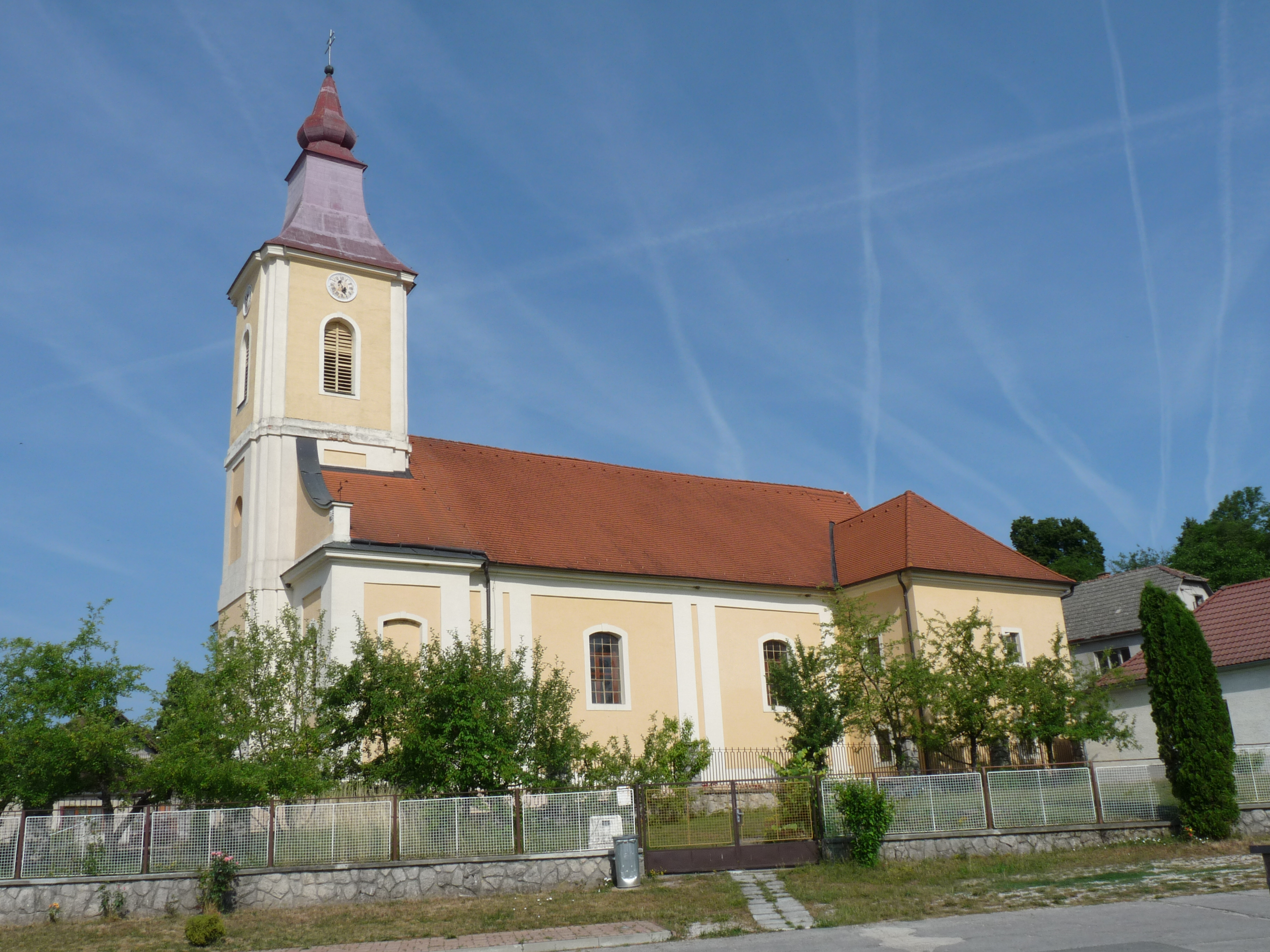 Kostol na námesti v Dobrej Vode